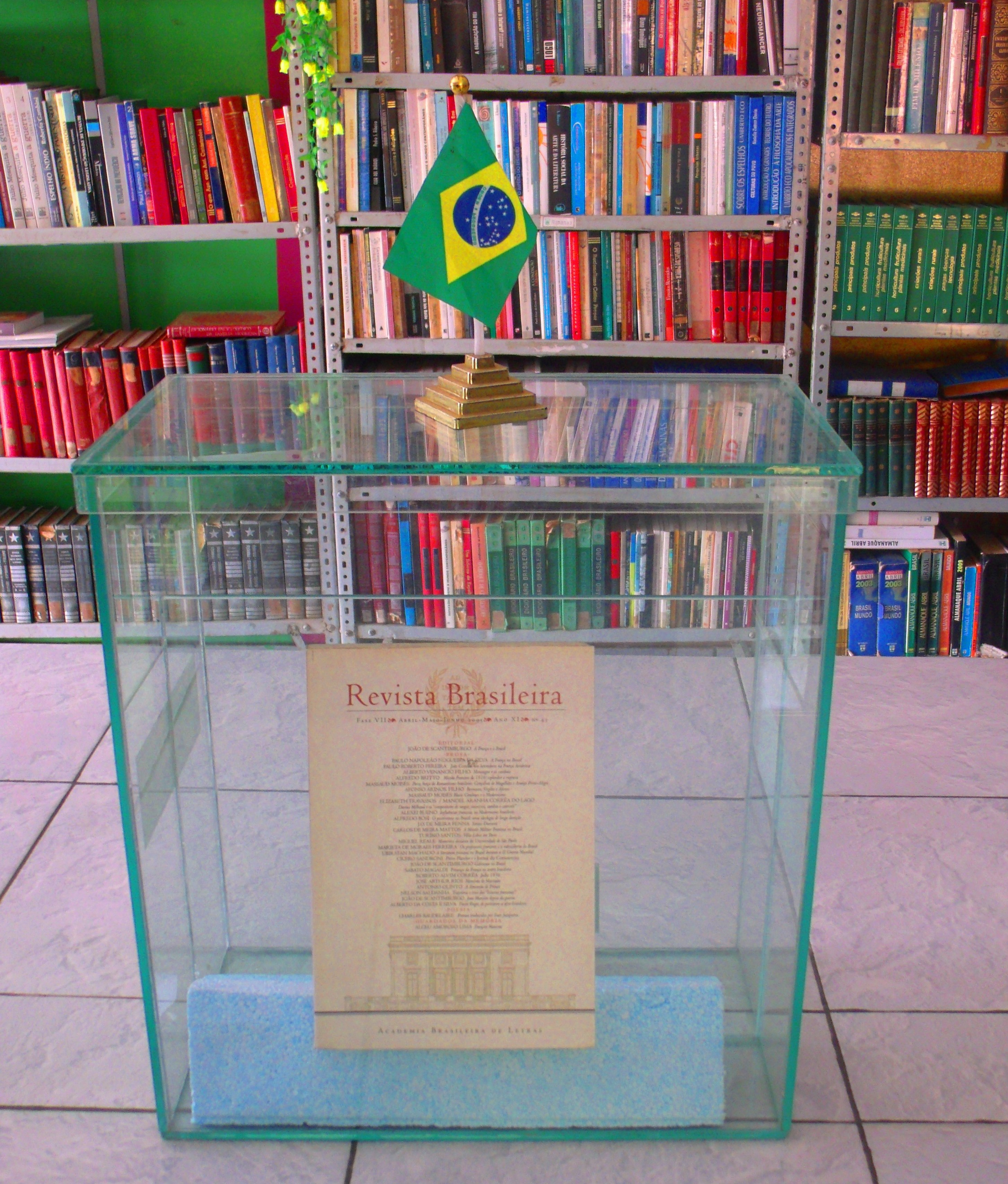 Vitrine encimada por uma mini bandeira do brasil, servindo de expositor numa biblioteca municipal, para uma Revista Brasileira, uma Revista da Academia Brasileira de Letras.